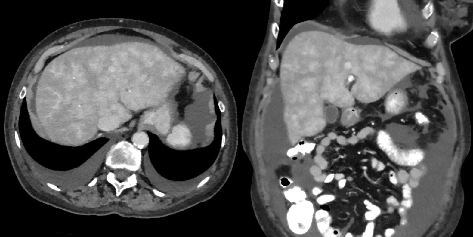 Chronische Stauungsleber / Muskatnussleber in der Computertomographie bei einer 69-jährigen in der portalvenösen Kontrastmittelphase. Axial und coronar. Zusätzlich reichlich Aszites.